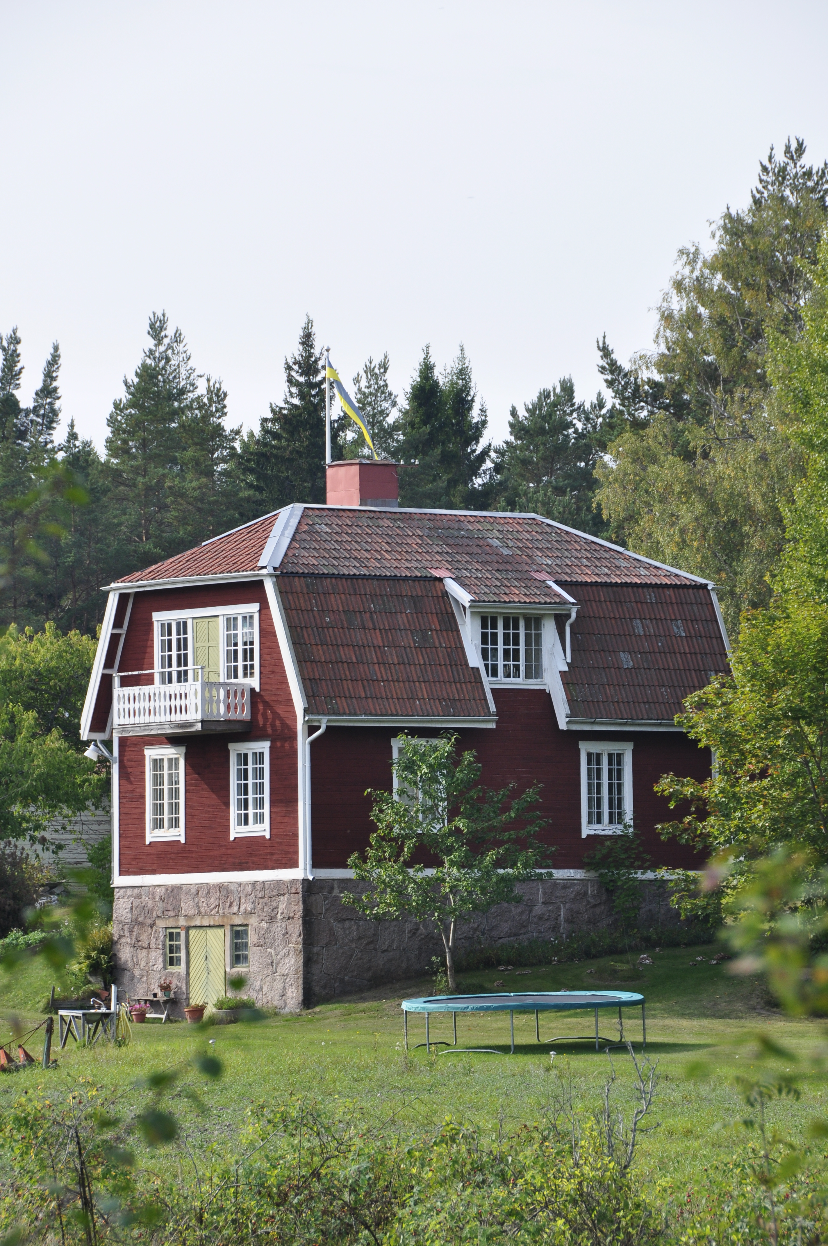 Trädgårdsmästarbostad, Kårboda, Ljusterö